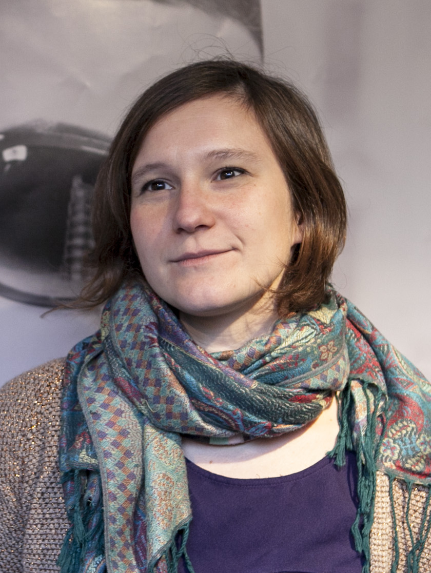 Irene Dionisio - réalisatrice de Le ultime cose (les dernières choses)